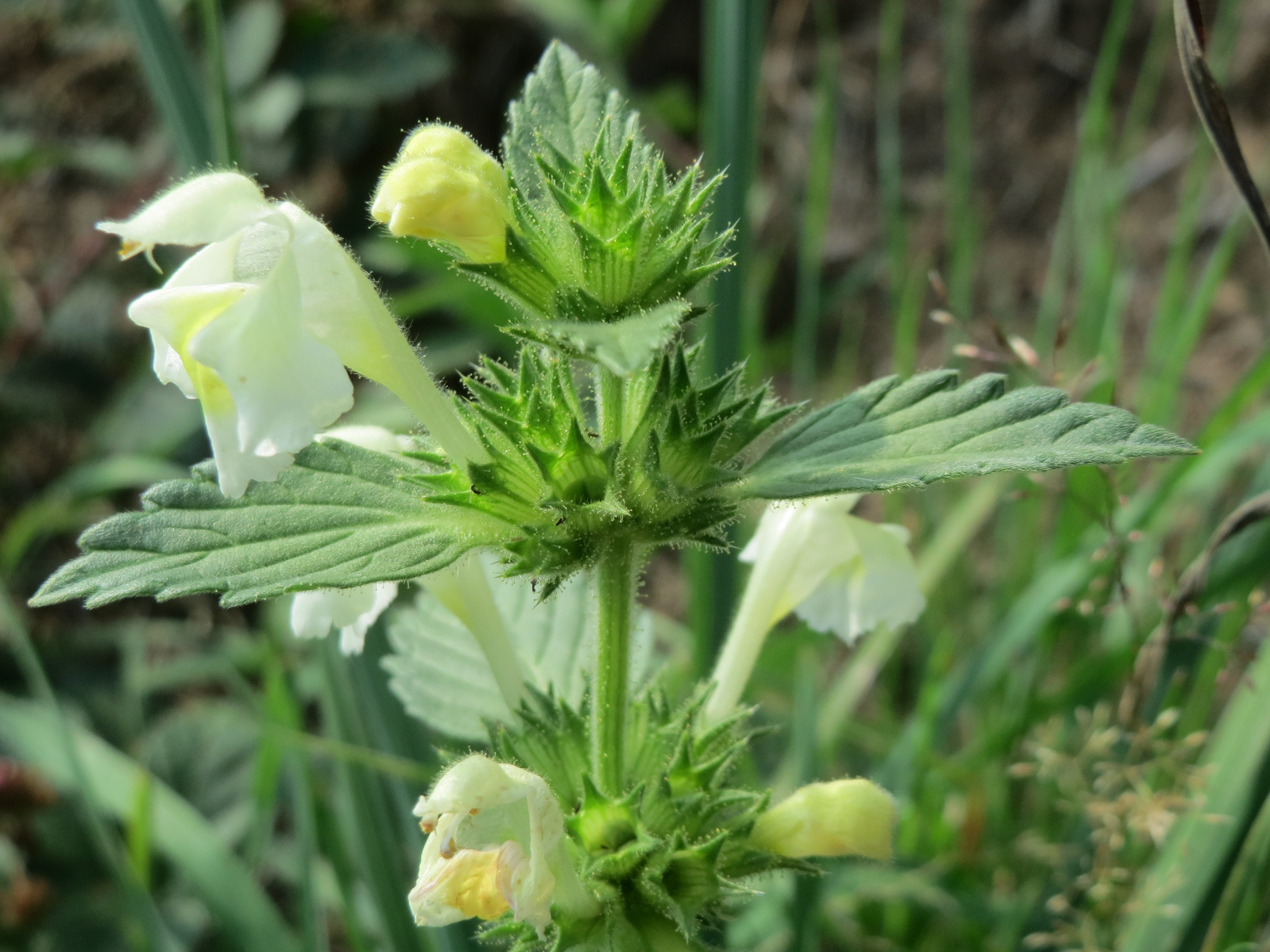 Gelber Hohlzahn (Galeopsis segetum) am Schalkenmehrener Maar